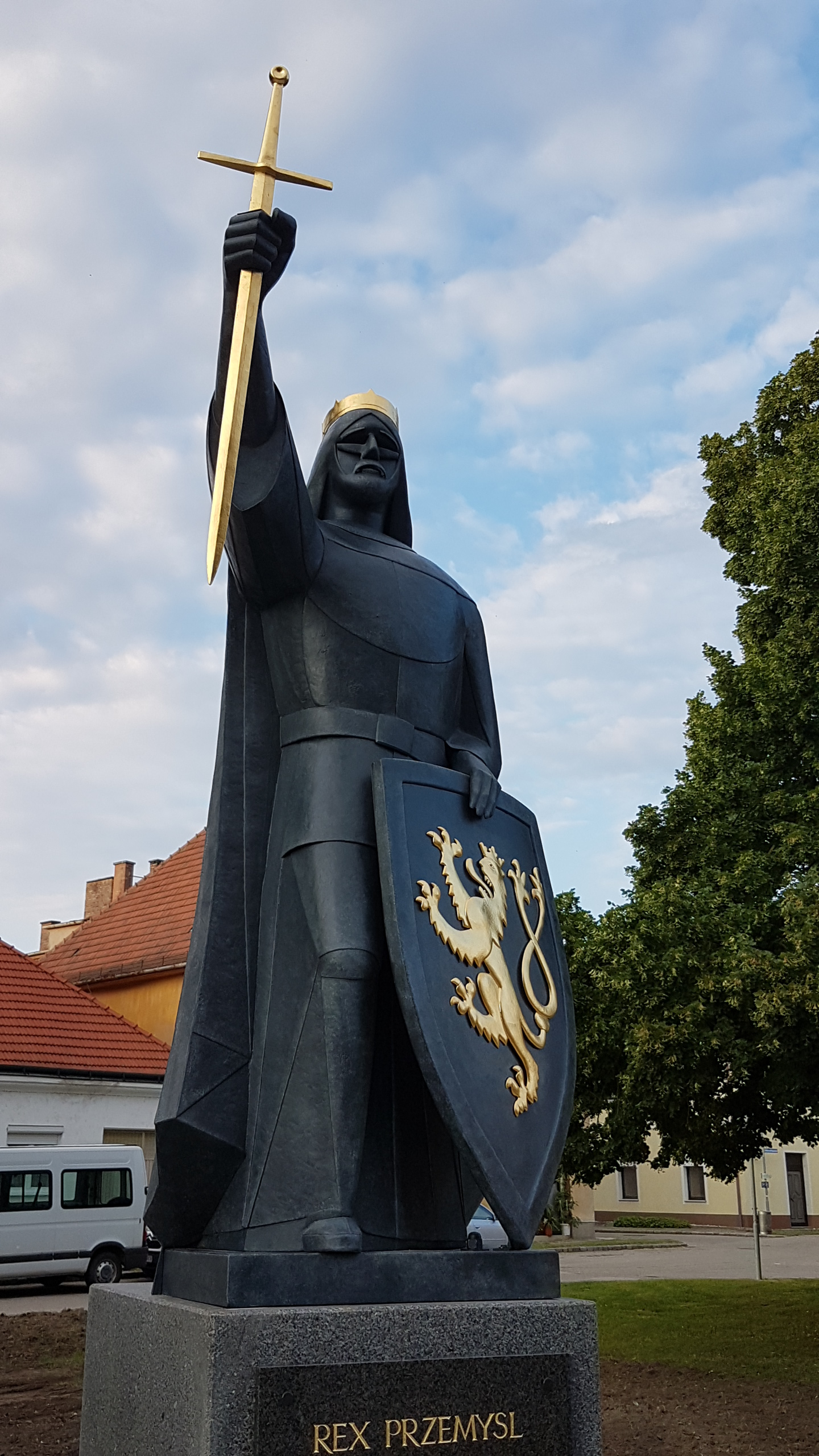 Socha Přemysla Otakara II. v Marcheggu po instalaci 18.6.2018